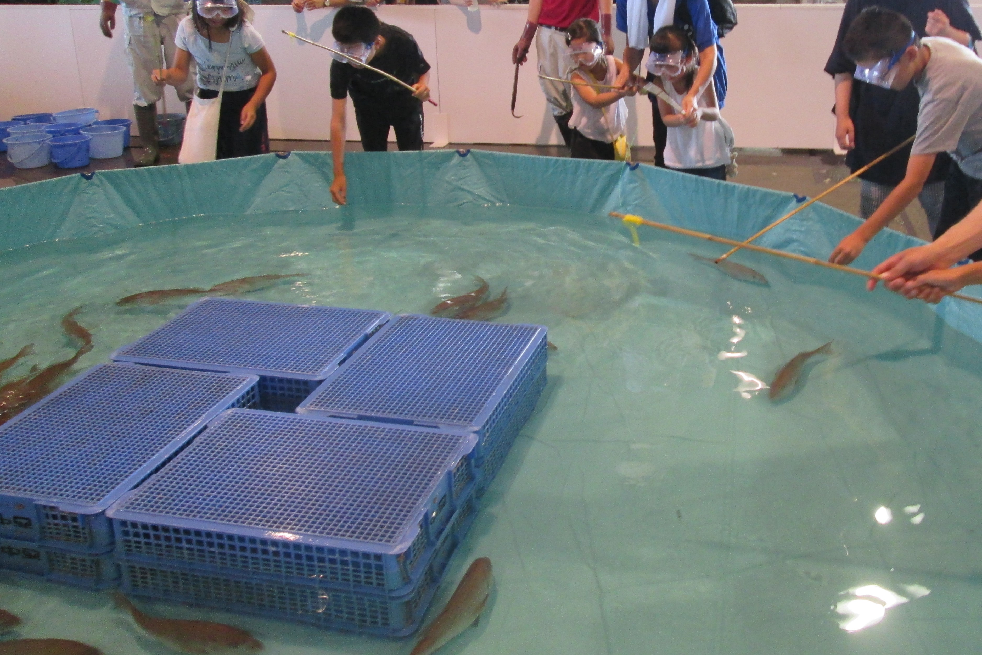 つりぼり